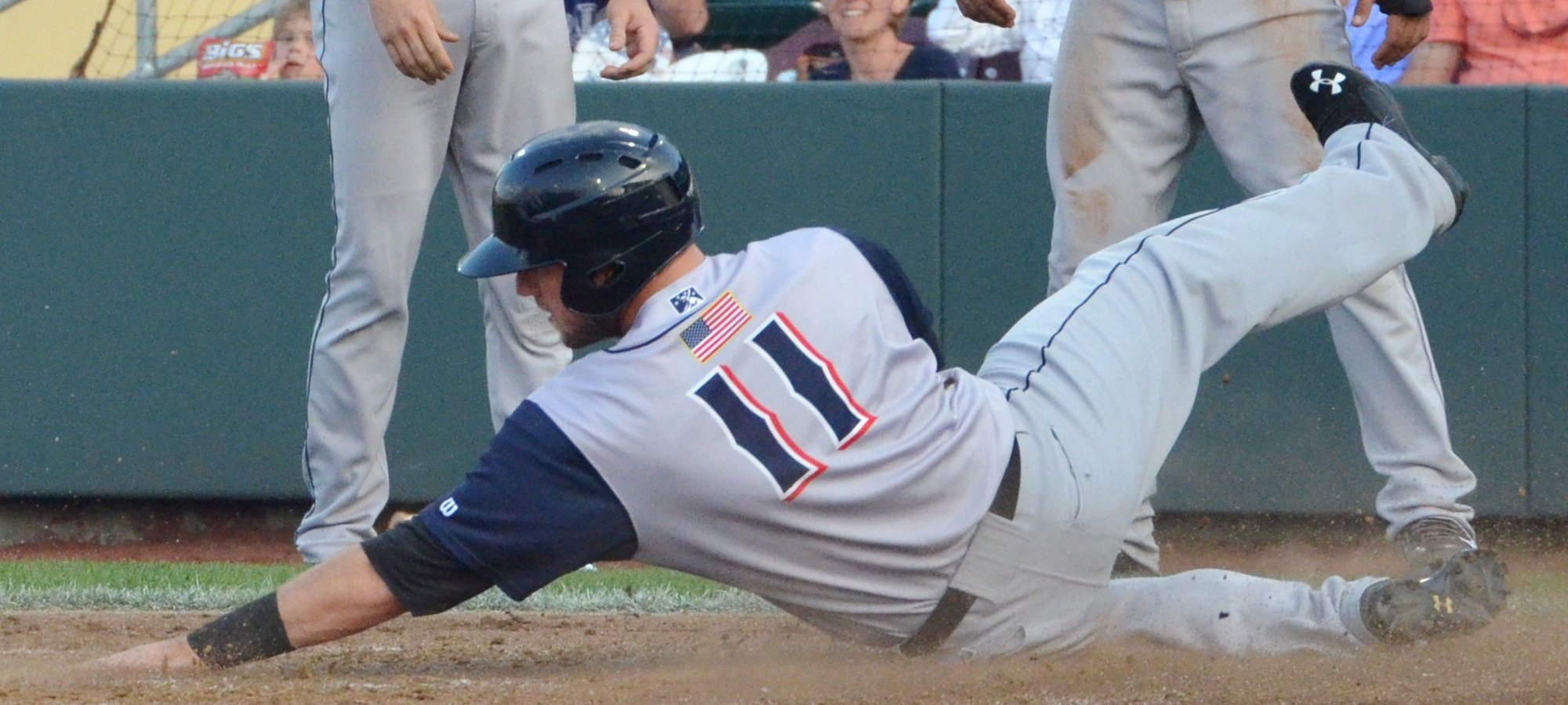 Kyle Parker